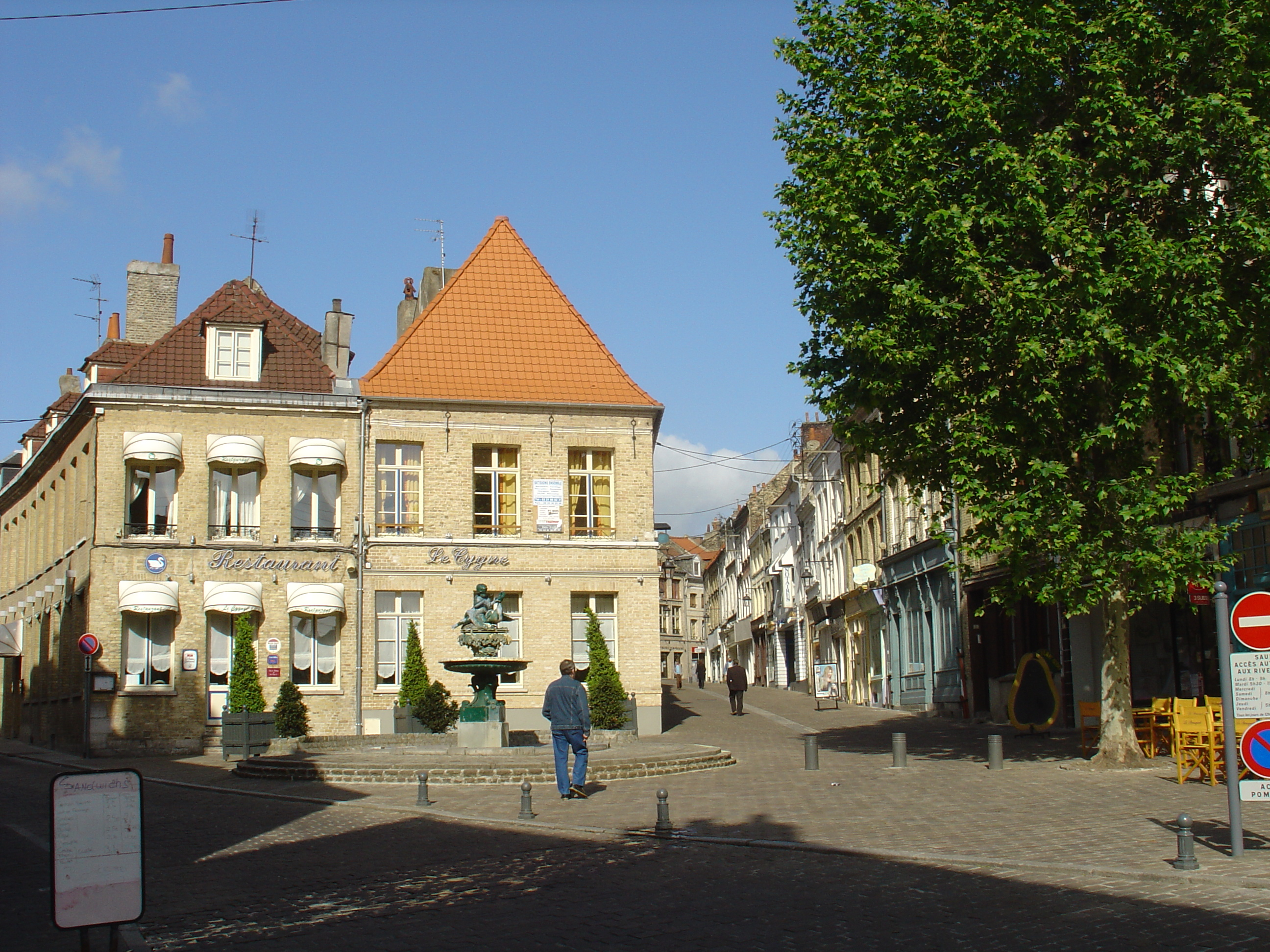 Rue des Epées à Saint-Omer